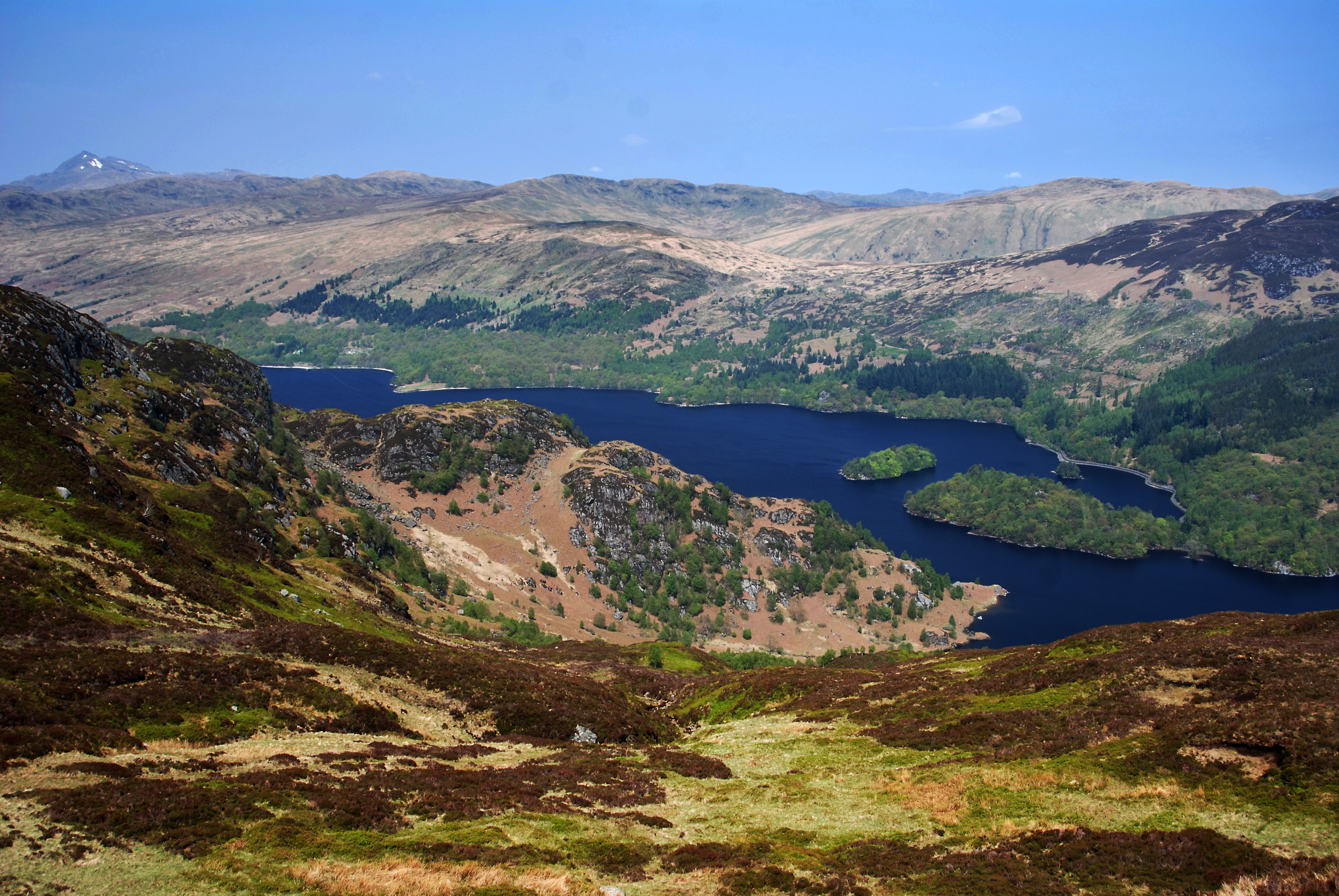 Loch Katrine, Scotland